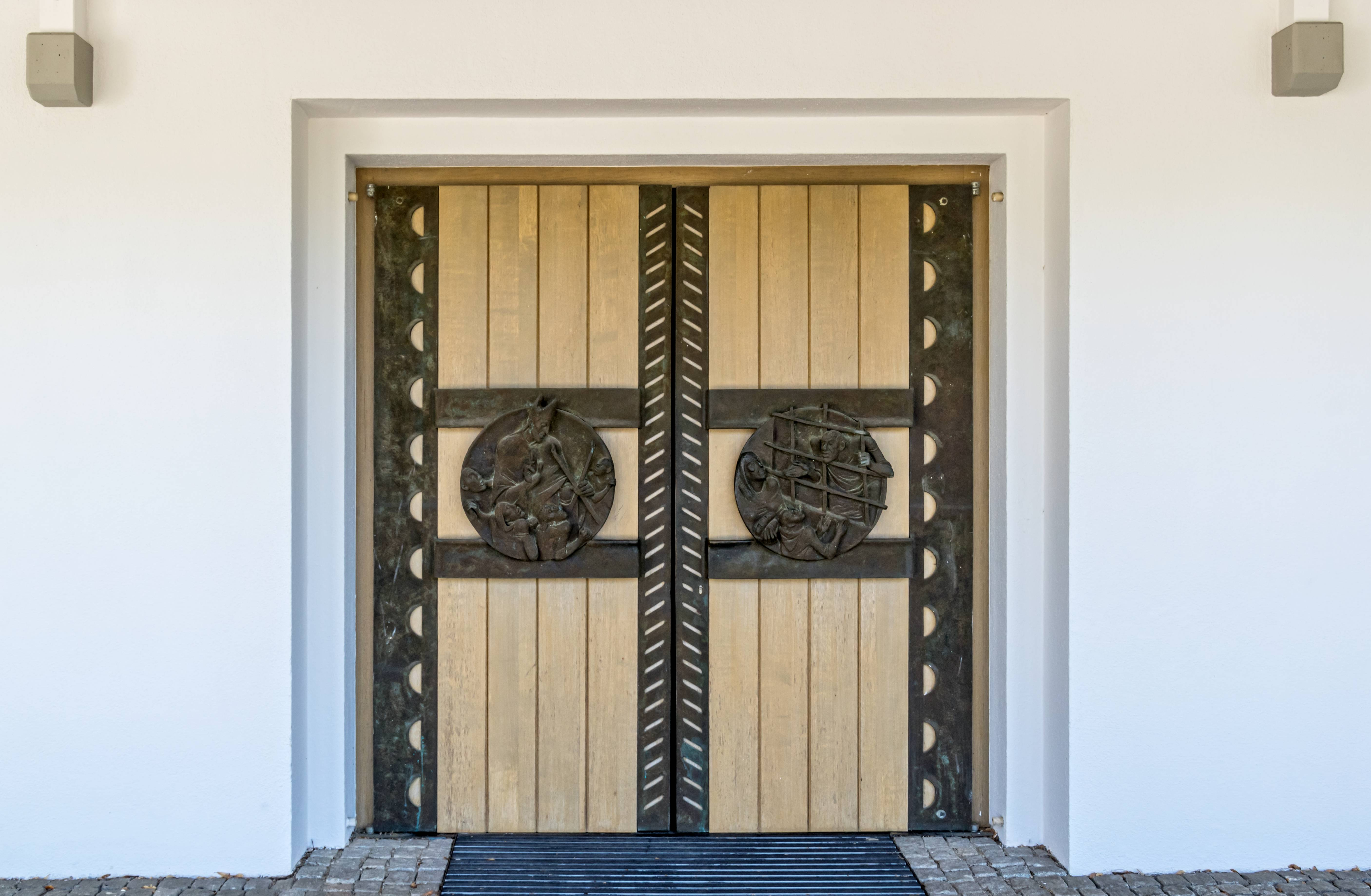 Bilder der katholischen Kirche St. Blasius in Wolfenweiler Eingangstüre der Kirche